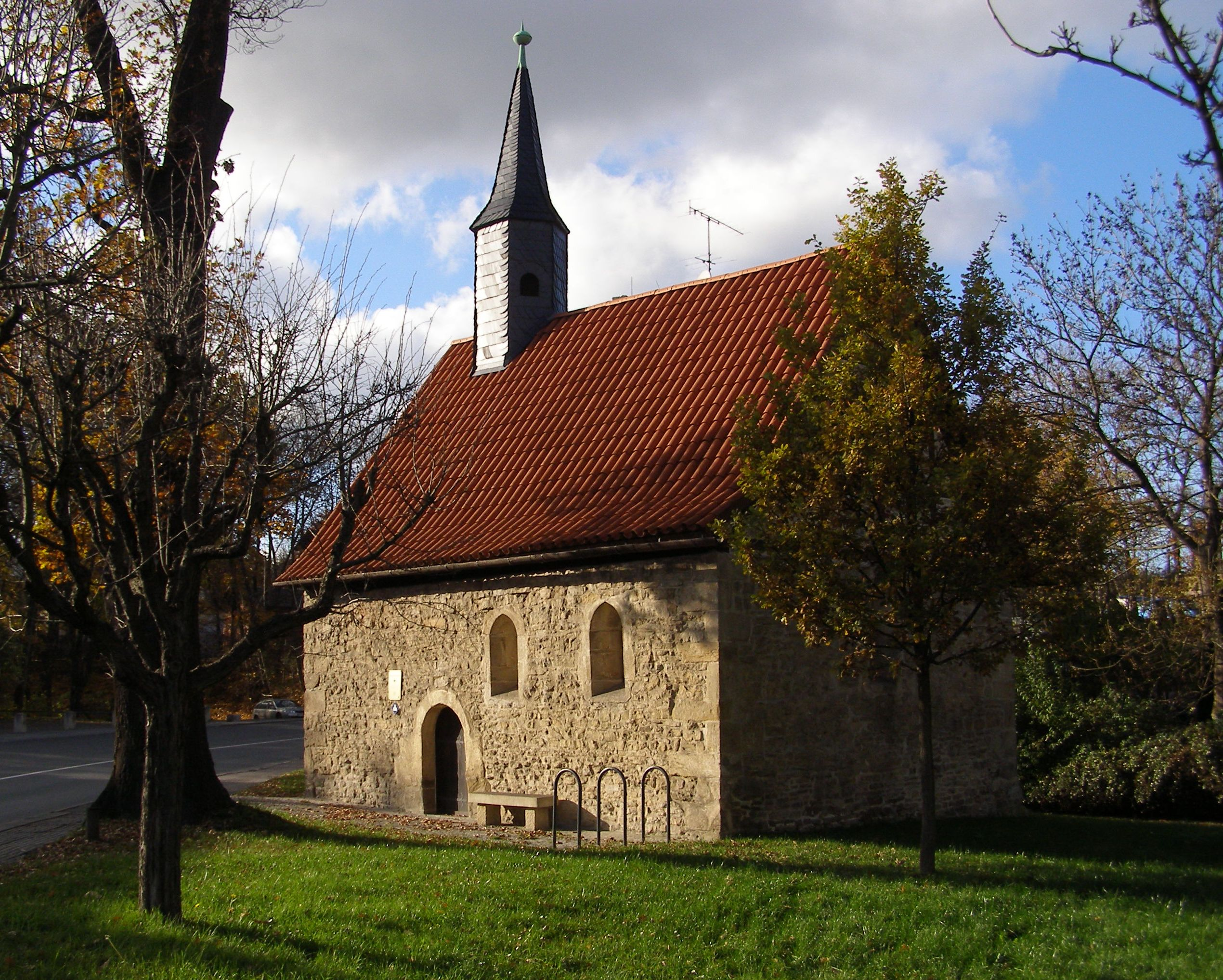 Martinskapelle auch Siechenkapelle genannt